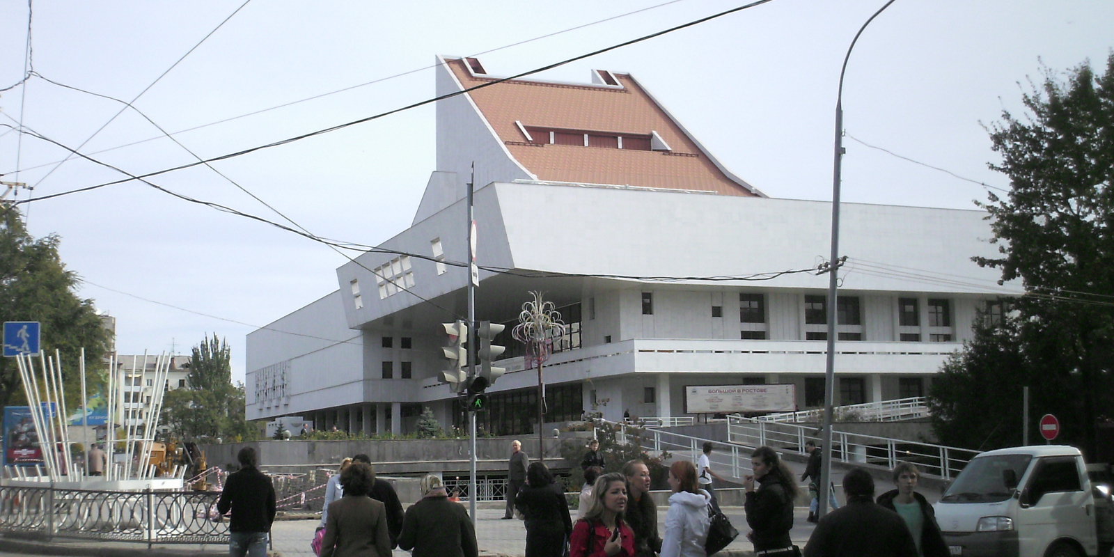 Музикальний театр: Ростов на Дону, вул. Велика Садова